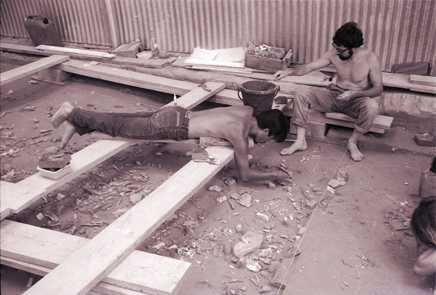 Les archéologues au travail à Pincevent